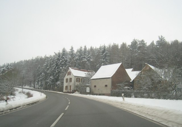 Altenhof (B48)